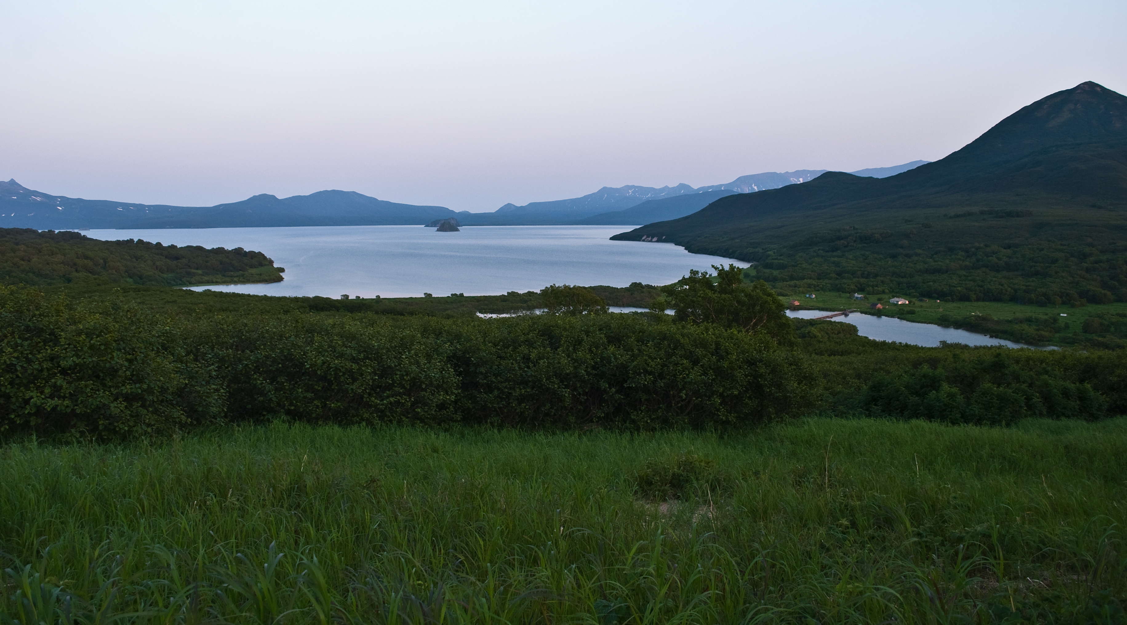 Курильское озеро, Усть-Большерецкий район This image is related to the protected area of Russia number 4110184